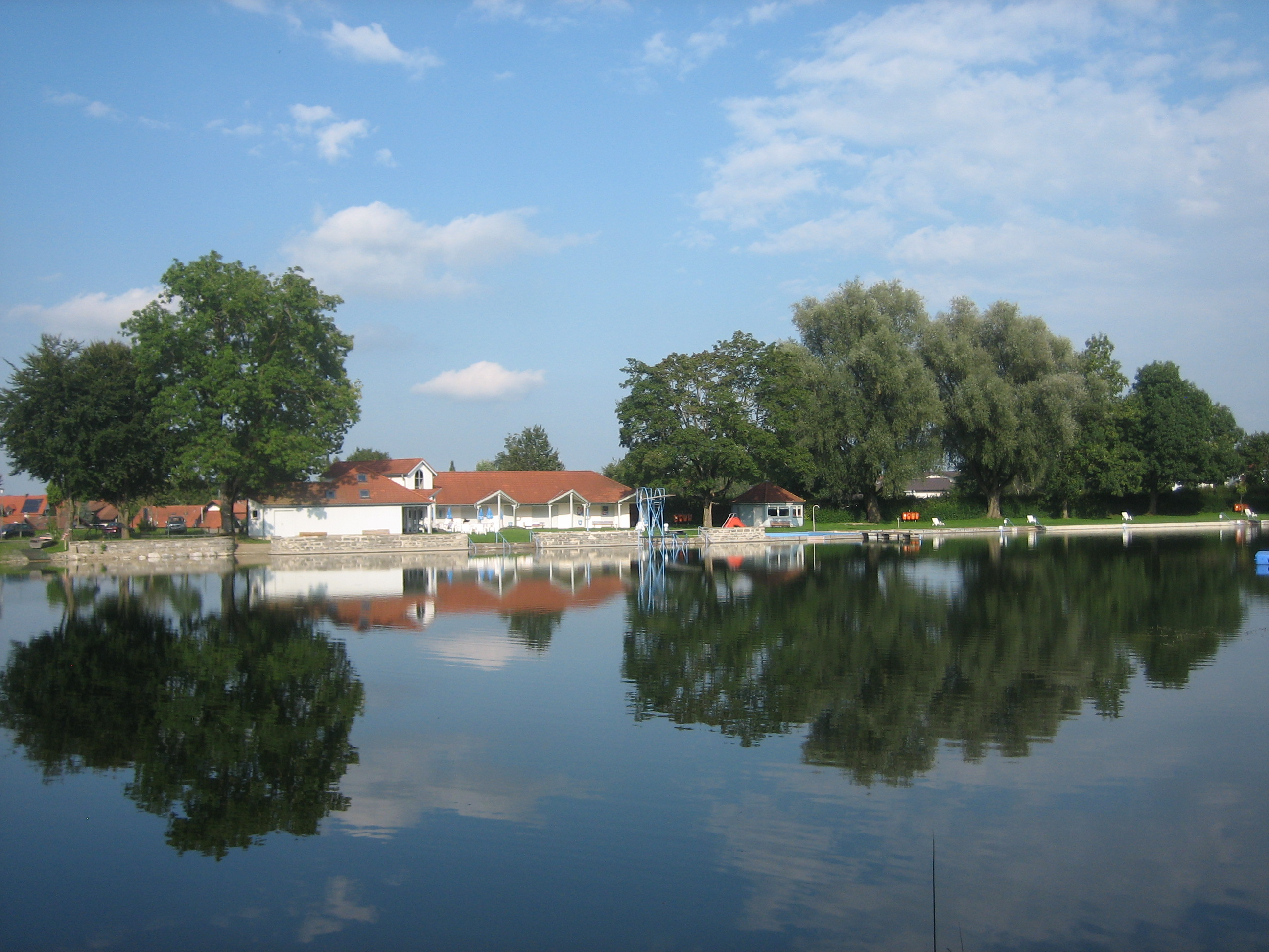 Freibad Clevers bei Bad Grönenbach